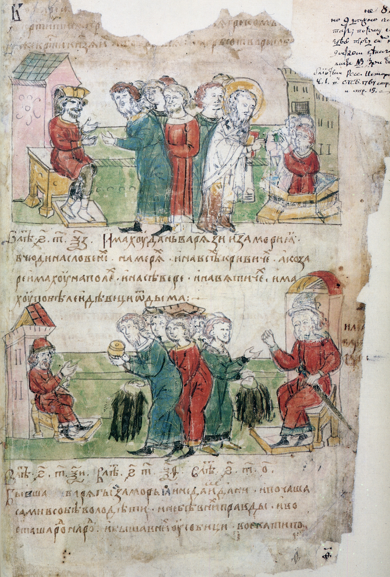 Радзивилловская летопись, л. 8r. Миниатюры: Обращение болгар к византийскому императору Михаилу с просьбой крестить их; крещение болгар при царе Михаиле (наверху) Tекст из Радзивиловской летописи: "... Болгаре же увидевше, яко не могоше стати противу, креститися просиша и покоритися греком. Цар же крести княза их и боляры вся. ..." Плата дани славянами (кривичами) и чюдью – варягам, а полянами, северянами и вятичами – хазарам; размер дани – белка и девица от дыма (внизу) Tекст из Радзивиловской летописи: "... Имаху дань варязи из замория в чюди, на словенех, на мерях, и на всех кривичех. А козаре имаху на полех, и на севере, и на вятичех, имаху по беле и девеци от дыма. ..." Литература: Кукушкина: Радзивиловская летопись. Текст. Исследование. Описание миниатюр, стр. 305-306